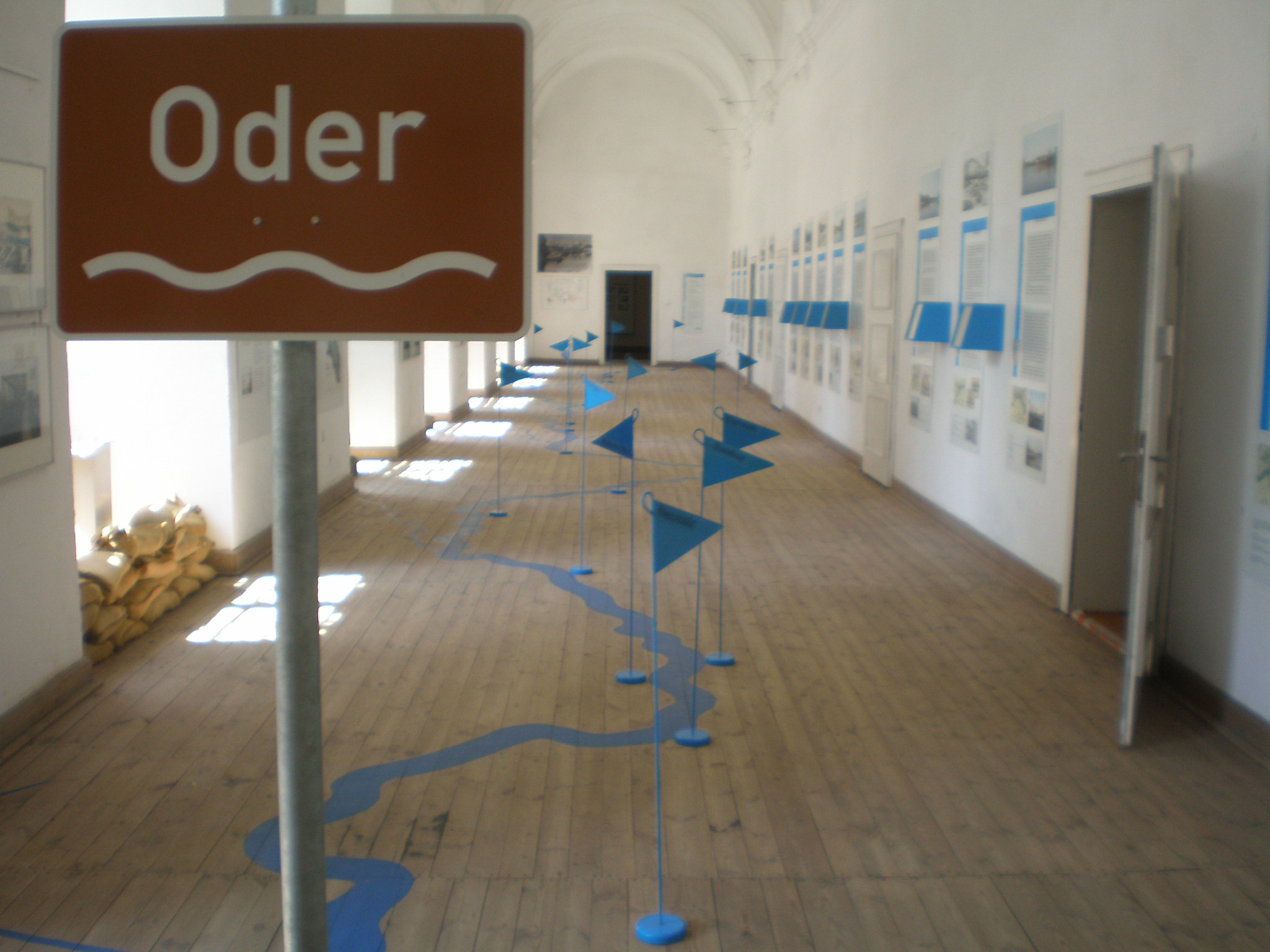 Expozice o řece Odře (Oder) v polském zámku Lubiąż